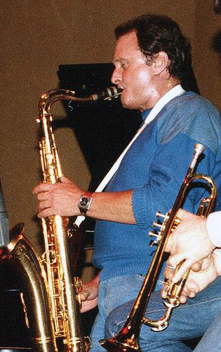 Stan Getz (Bildausschnitt)